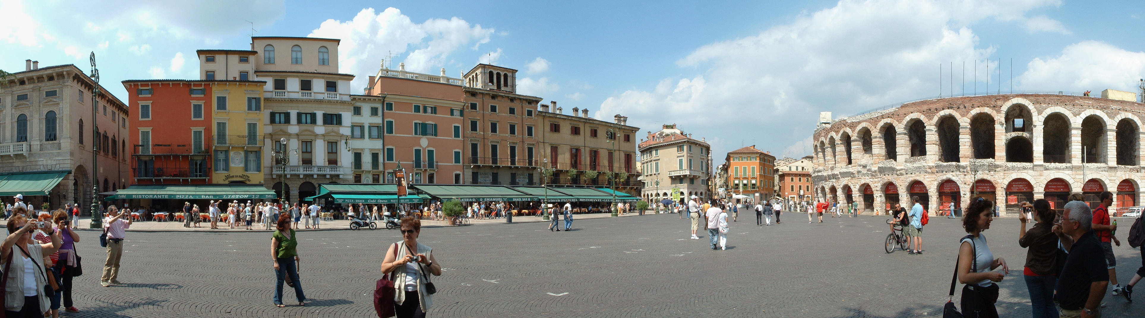 Piazza Bra a Verona, sulla destra l'Arena.